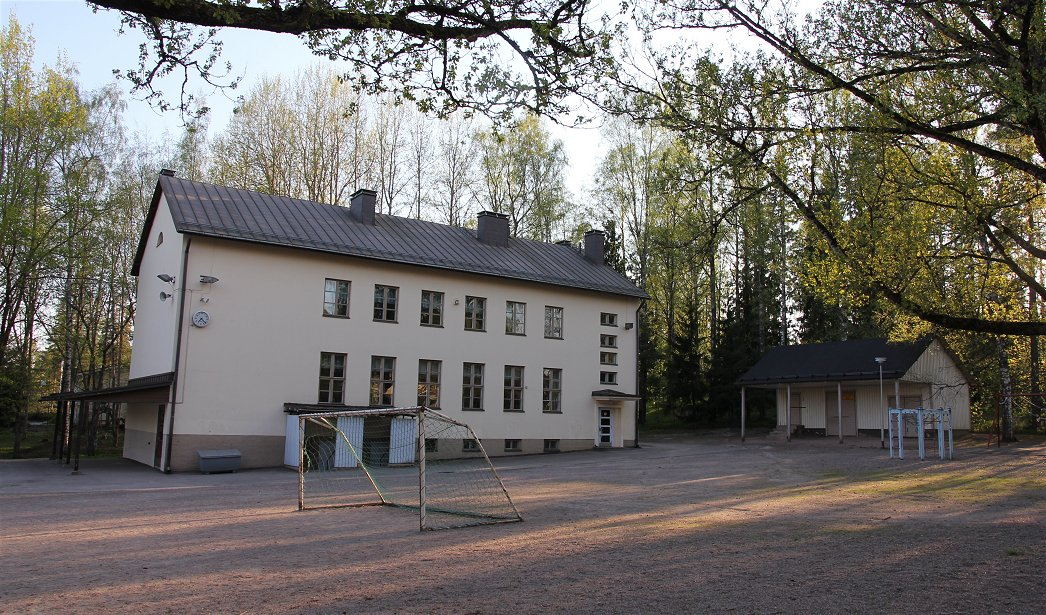 Rajatorpan koulu on Vantaan Myyrmäen suuralueen Vapaalan kaupunginosassa] sijaitseva, vuonna 1945 kansakouluna toimintansa aloittanut suomenkielinen peruskoulun alakoulu (luokka-asteet 1–6). Ensimmäinen koulurakennus (Ilpolan koulu, kuvassa) valmistui syksyllä 1948 ja uudempi rakennus marraskuussa 1964.